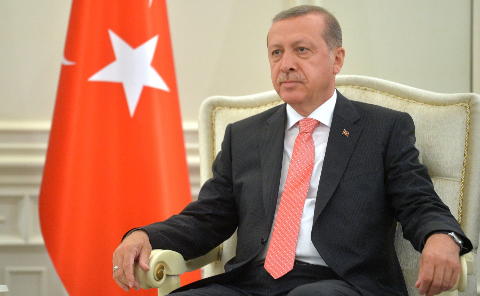 Встреча Президента России Владимира Путина с Президентом Турции Реджепом Тайипом Эрдоганом в Баку